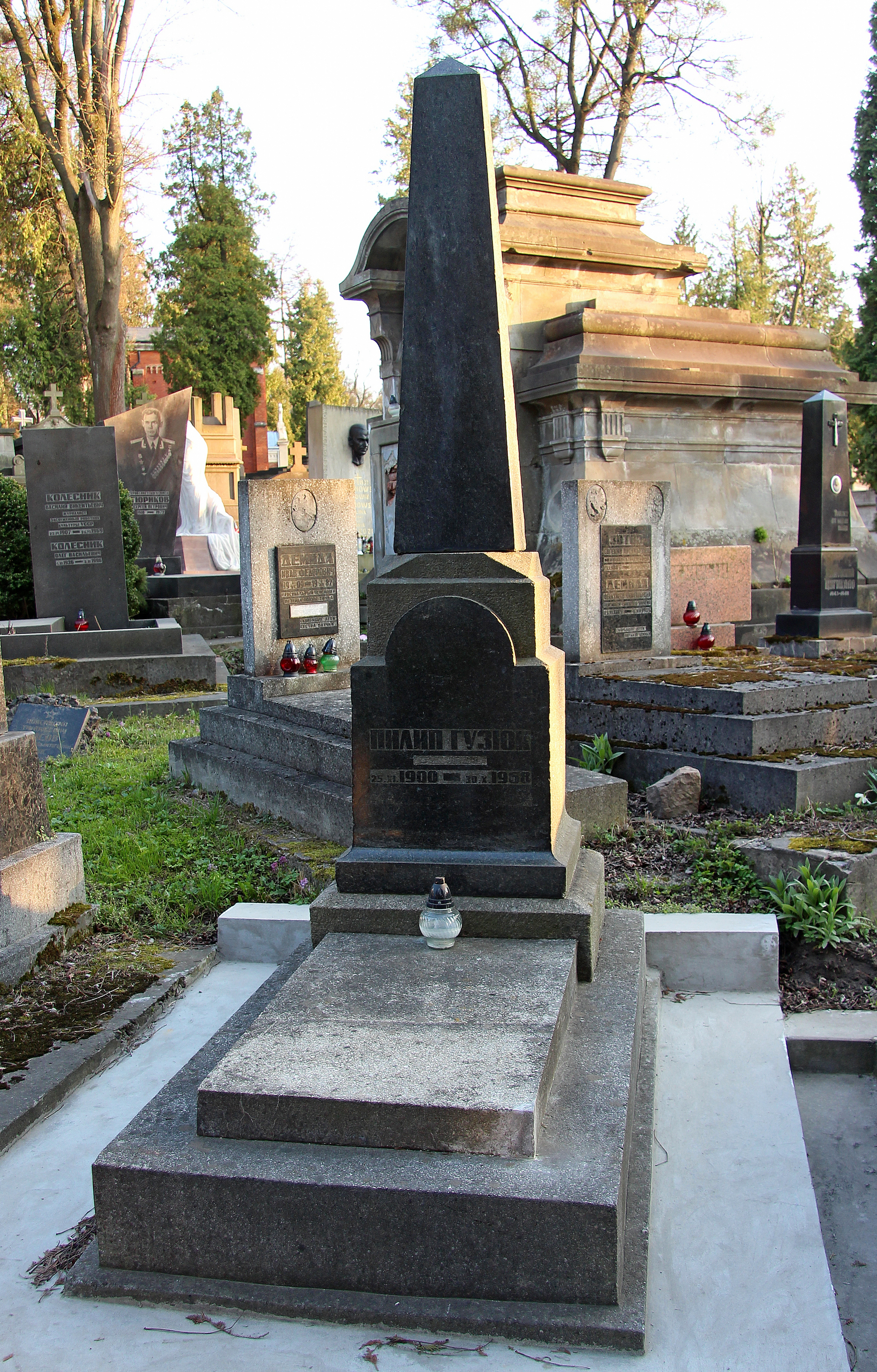 Пам'ятник на могилі П. Гузюка.Личаківський цвинтар , поле № 1.